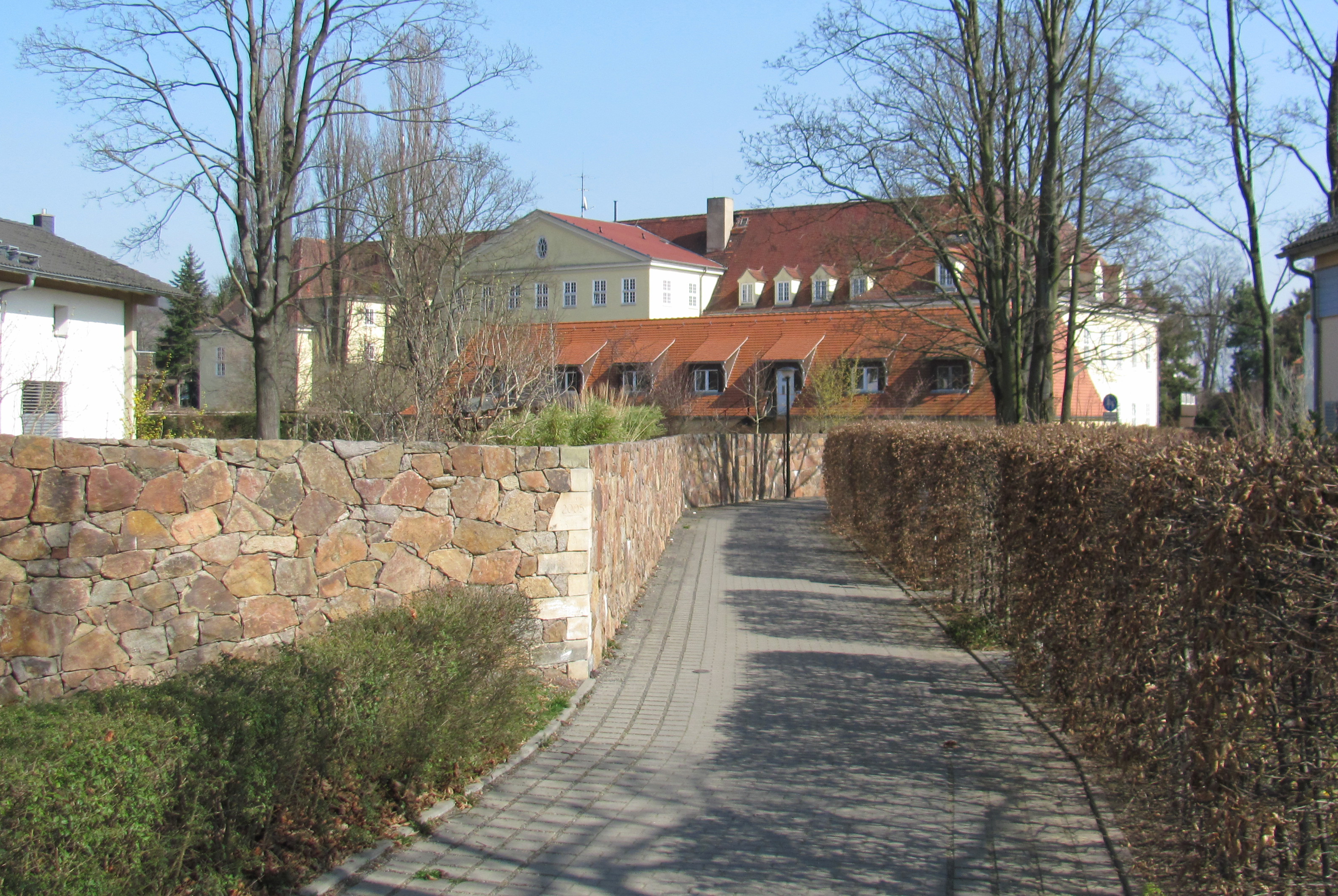 Radebeul-Niederlößnitz, Verwaltungsgebäude Elektrizitätsverband Gröba mit Garagenbau, von der Rückseite aus